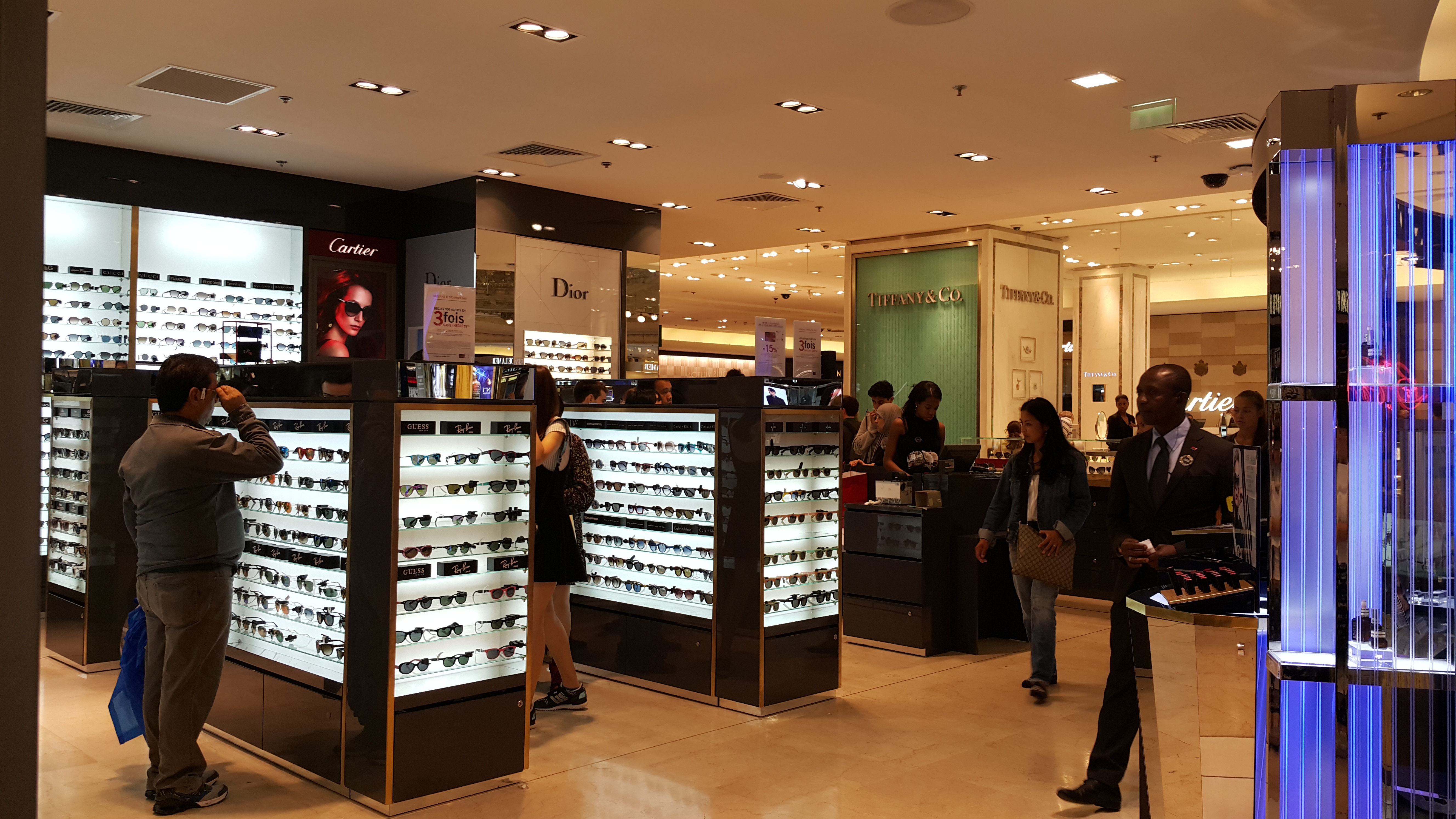 France - Paris, Galleries Lafayette